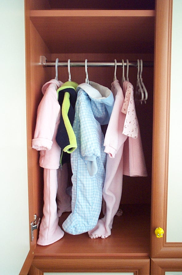 Wardrobe